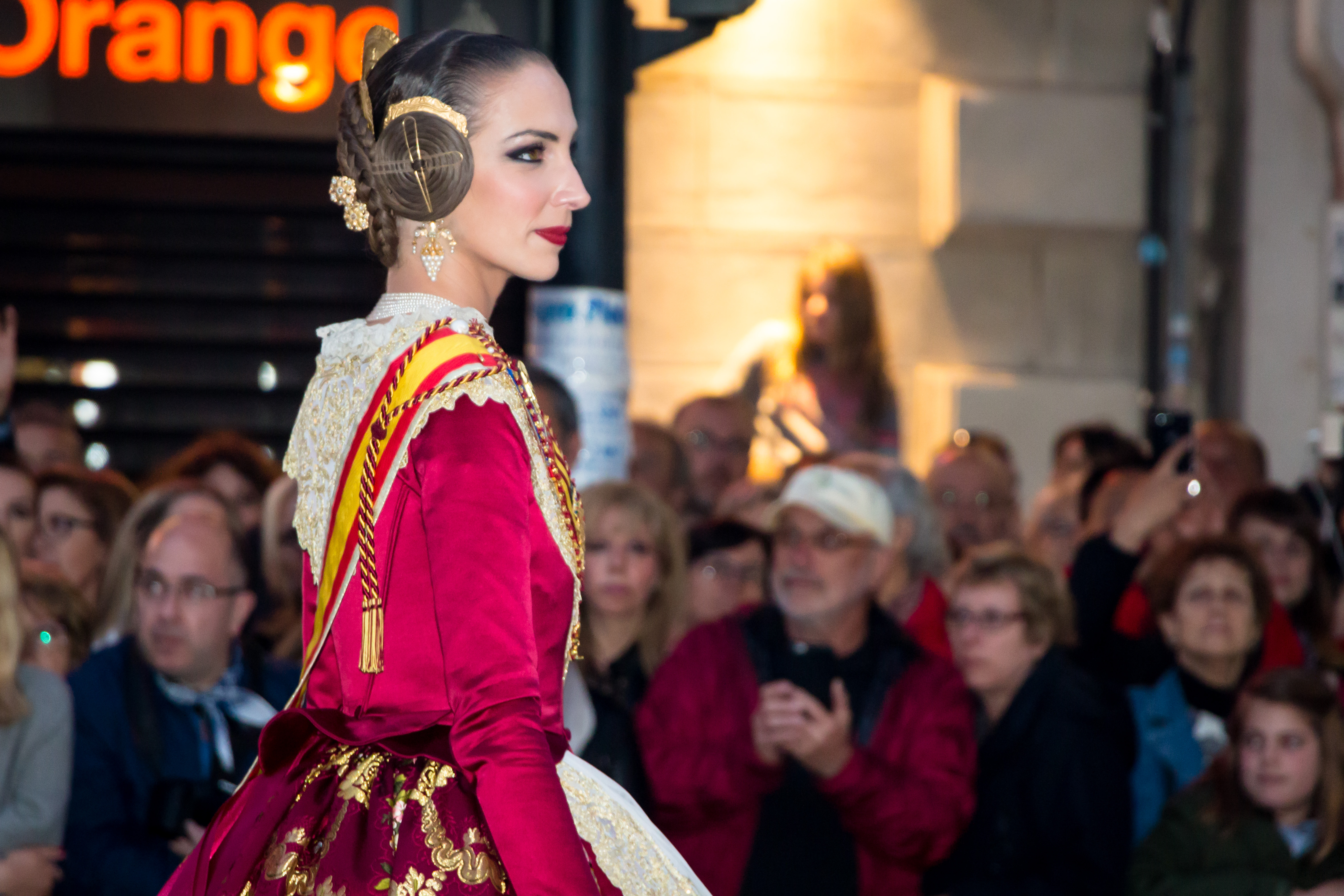 La Fallera Mayor de Valencia, Raquel Alario, desfila durante la Cavalcada del Foc de 2017 This is a photography of a Folklore festival in Spain (Wikidata id Q1143768).